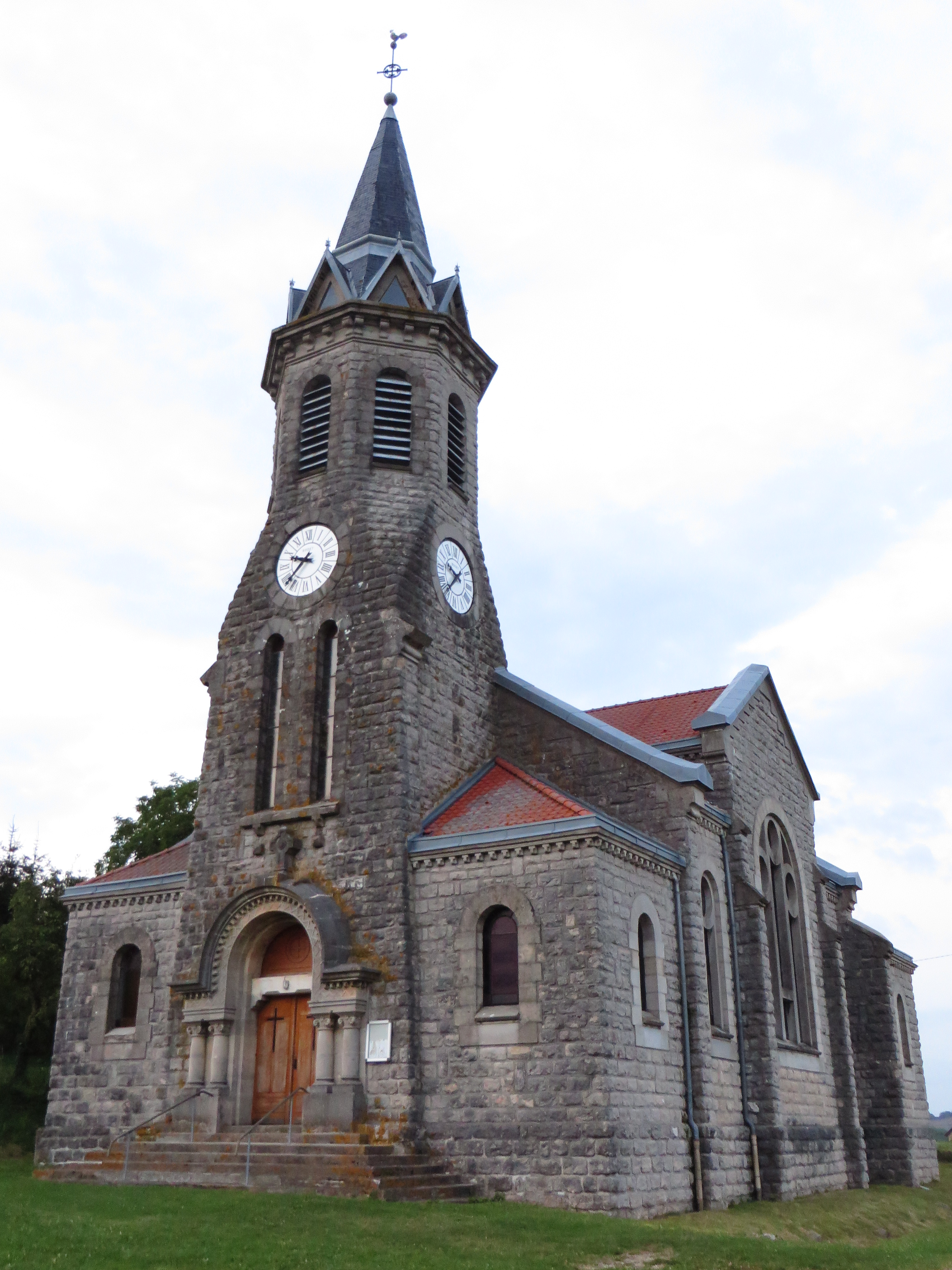 Wavrille L'église Saint-Hilaire